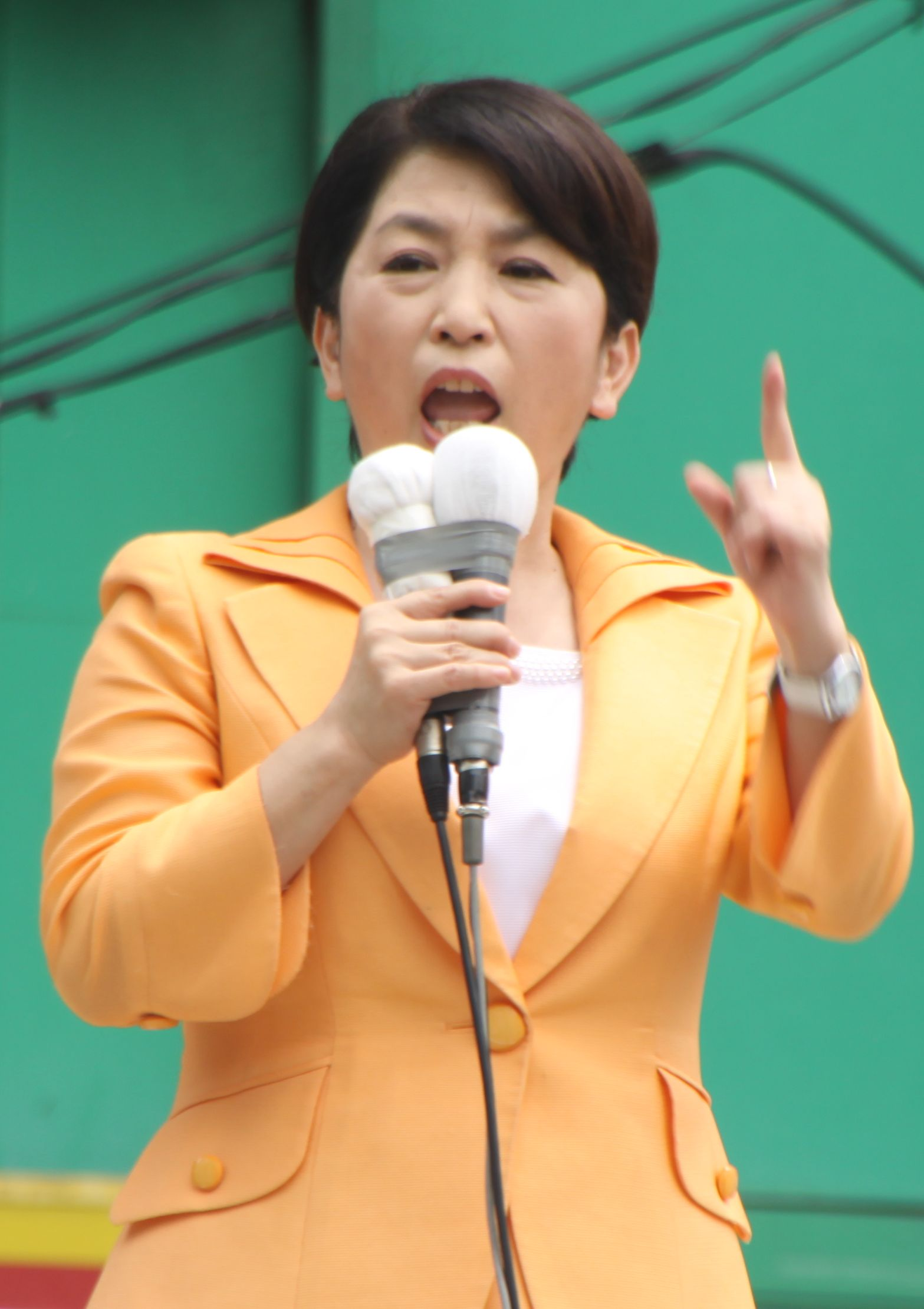 福島瑞穂、新宿駅東南口にて